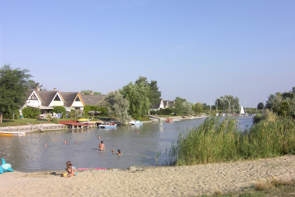 Badebucht bei Weiden am See